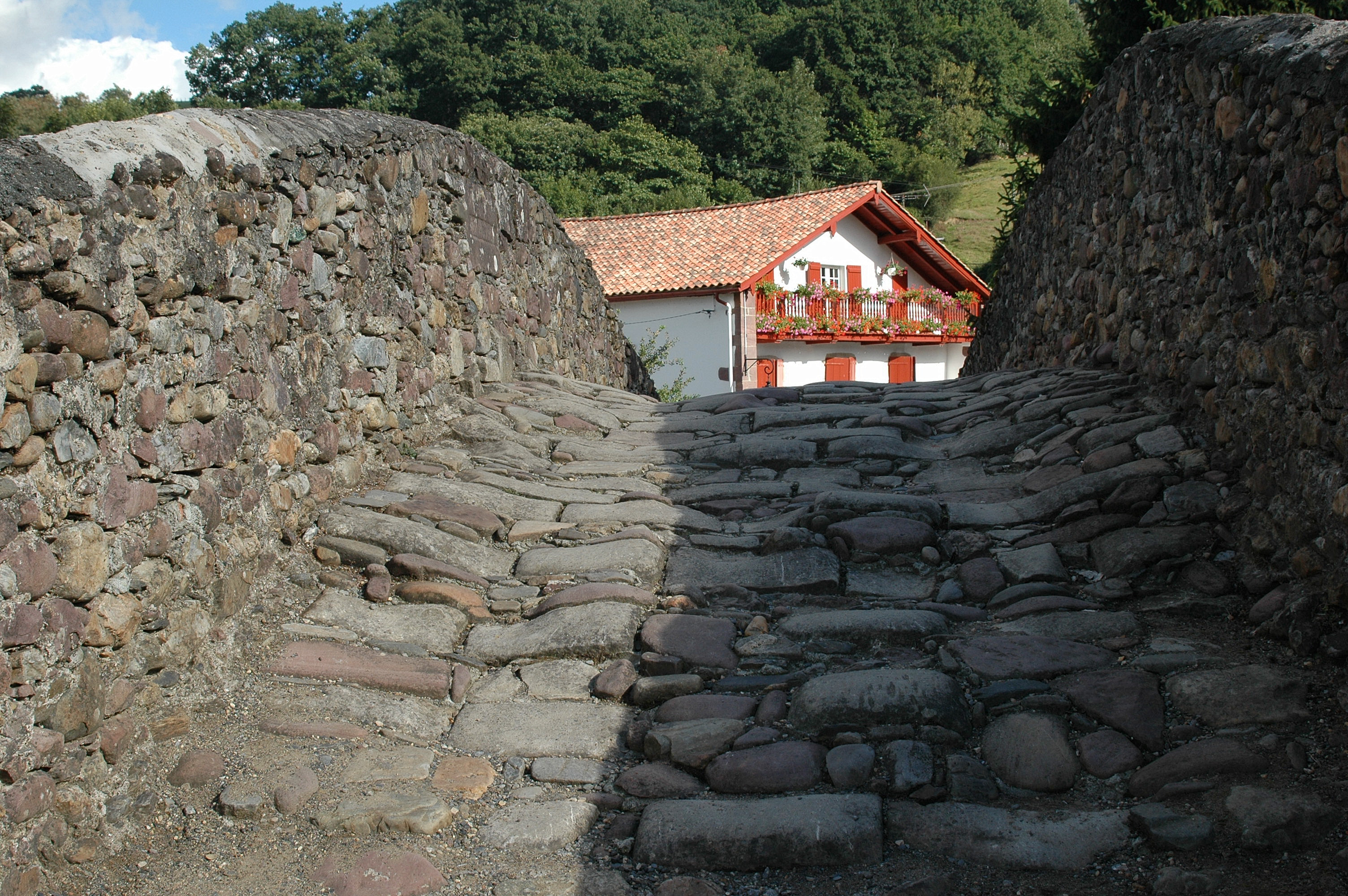 Saint-Étienne-de-Baïgorry, le pont romain (1661) sur la Nive des Aldudes. Photo prise le 03/08/06 par Harrieta171